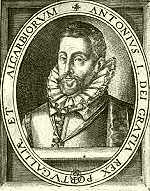 Antonio von Crato Andere Versionen